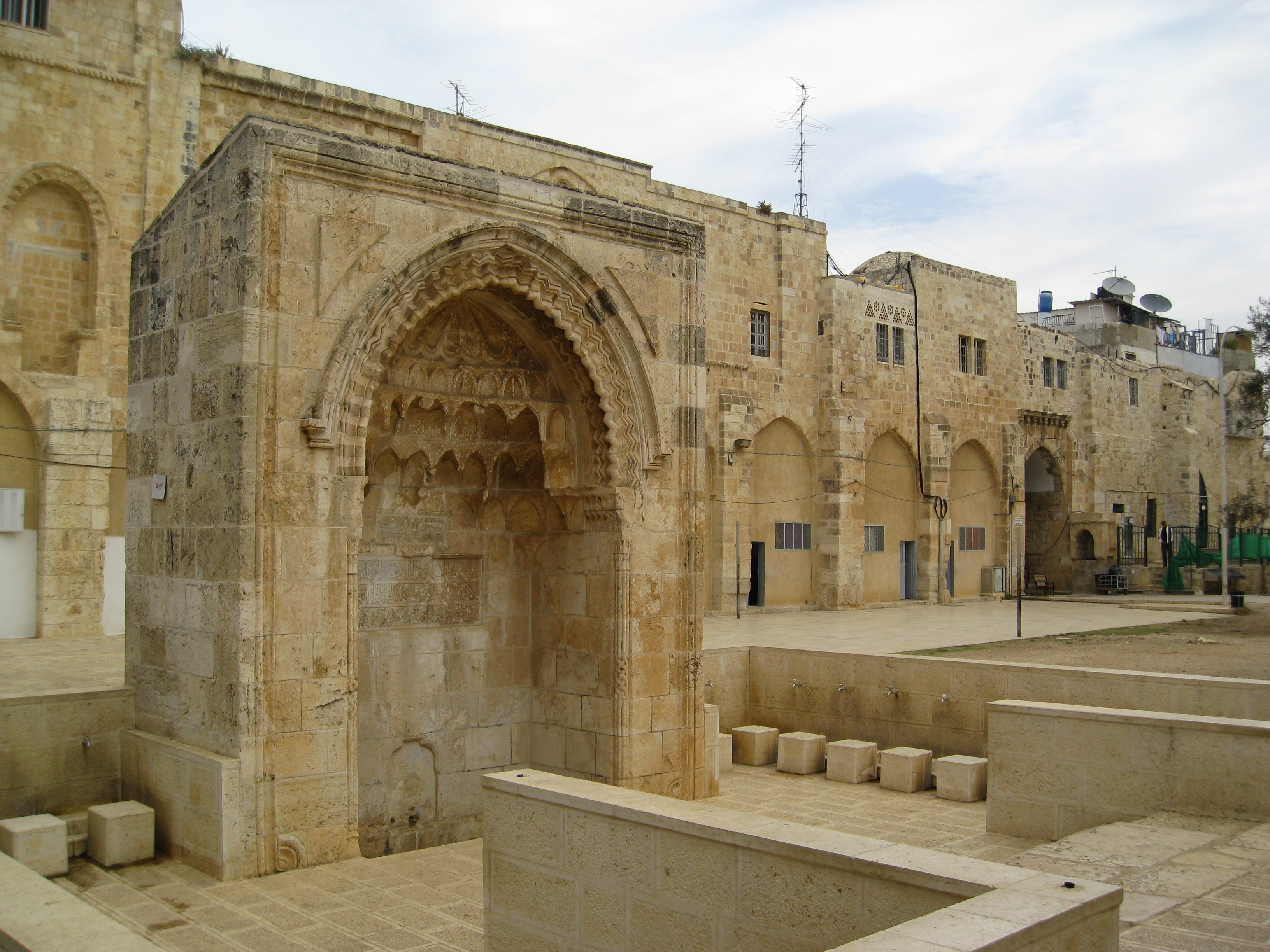 Jerusalem, Israel Jerusalem